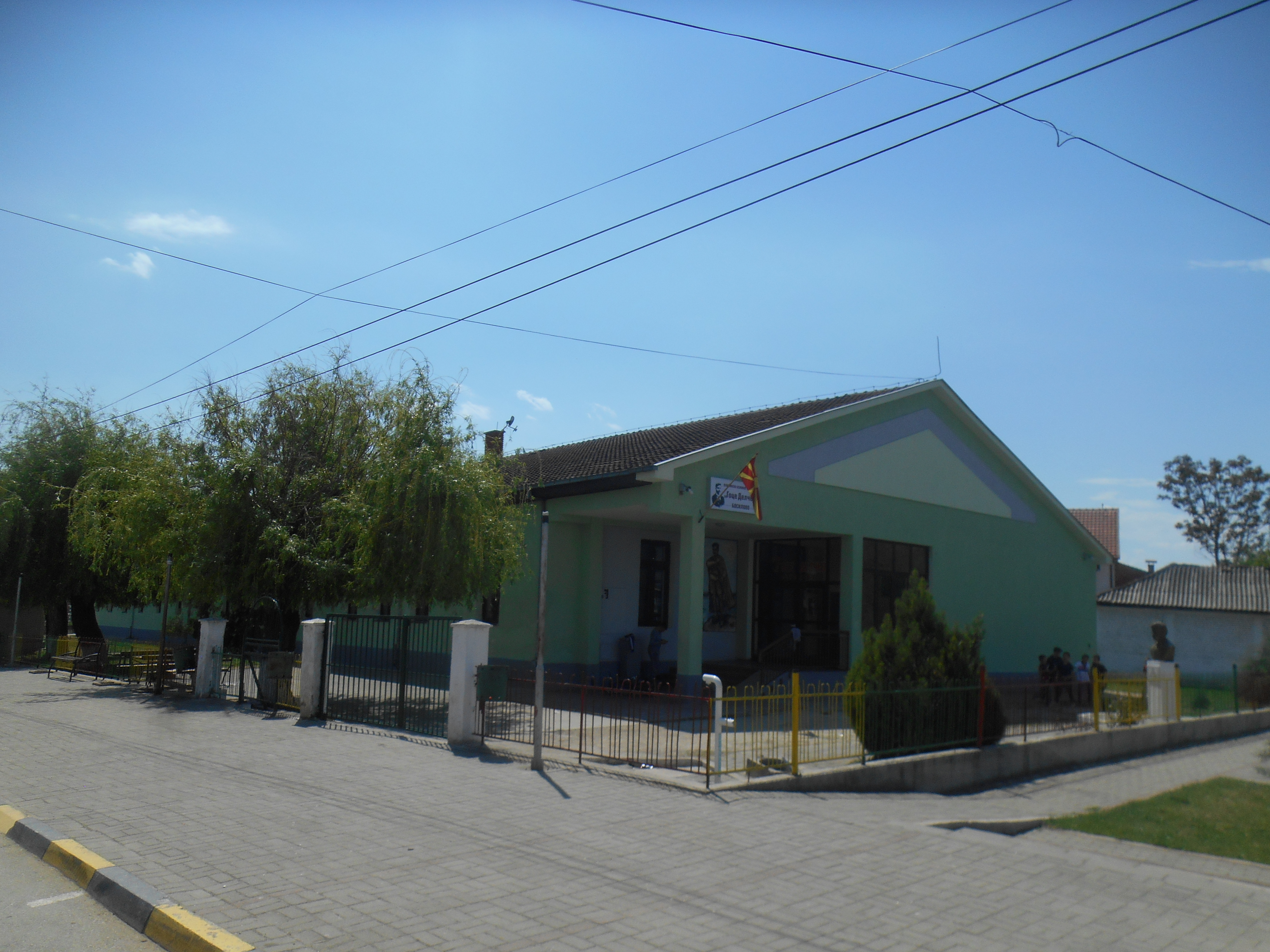 Основно училиште „Гоце Делчев“ - Босилово